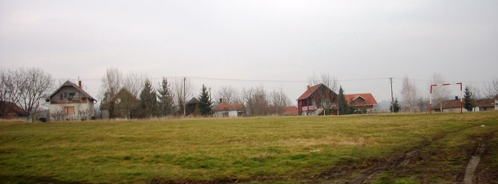 Zeletovo